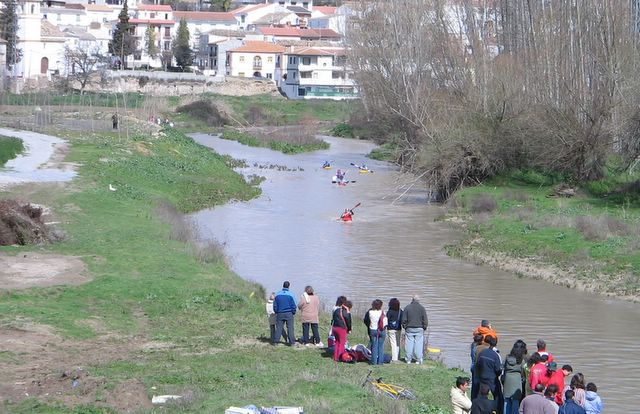 Piragüismo en Villanueva Mesía, Granada (España)